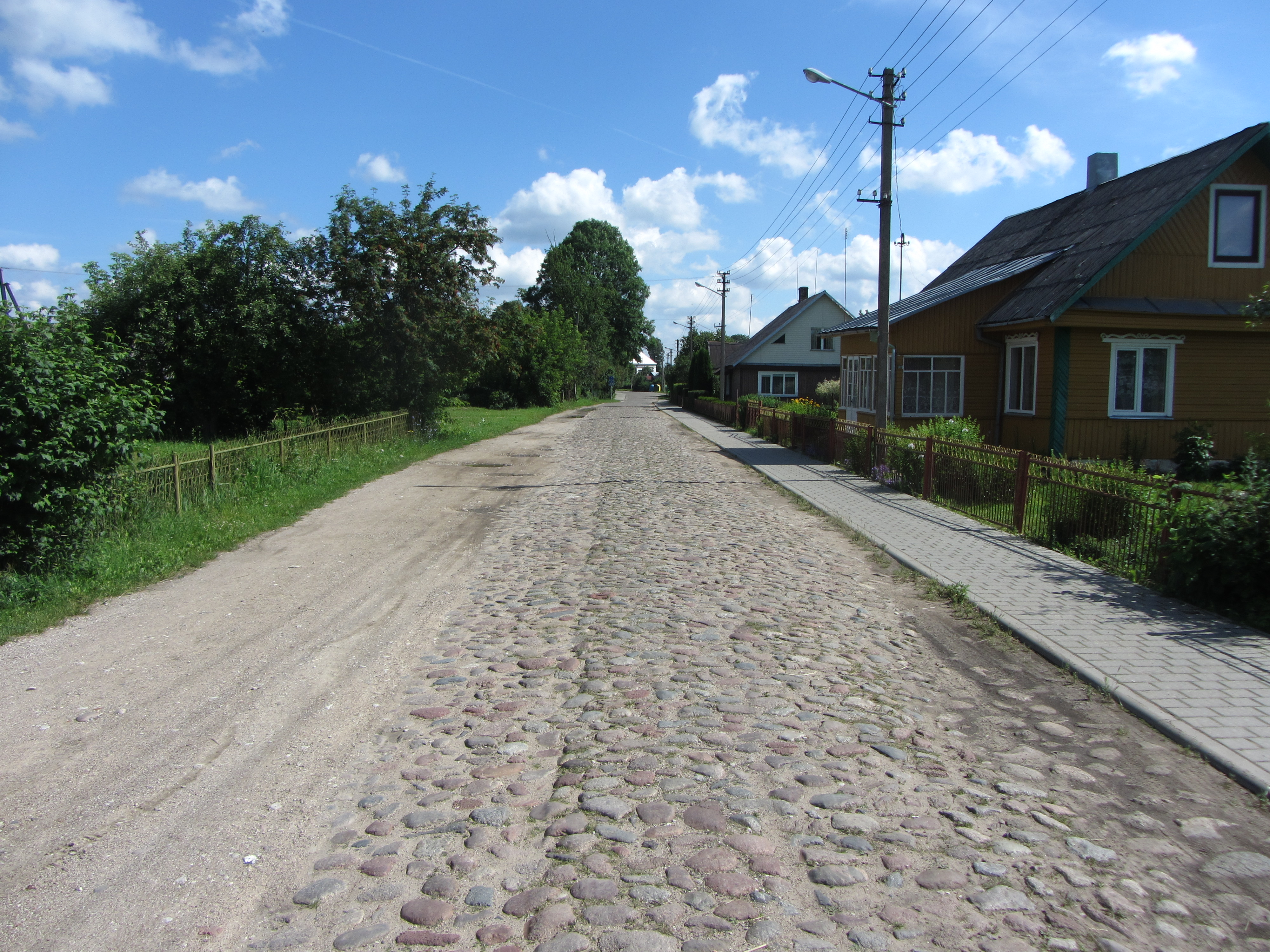 Užuperkasis, Lithuania